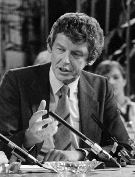 Wim Kok in 1982